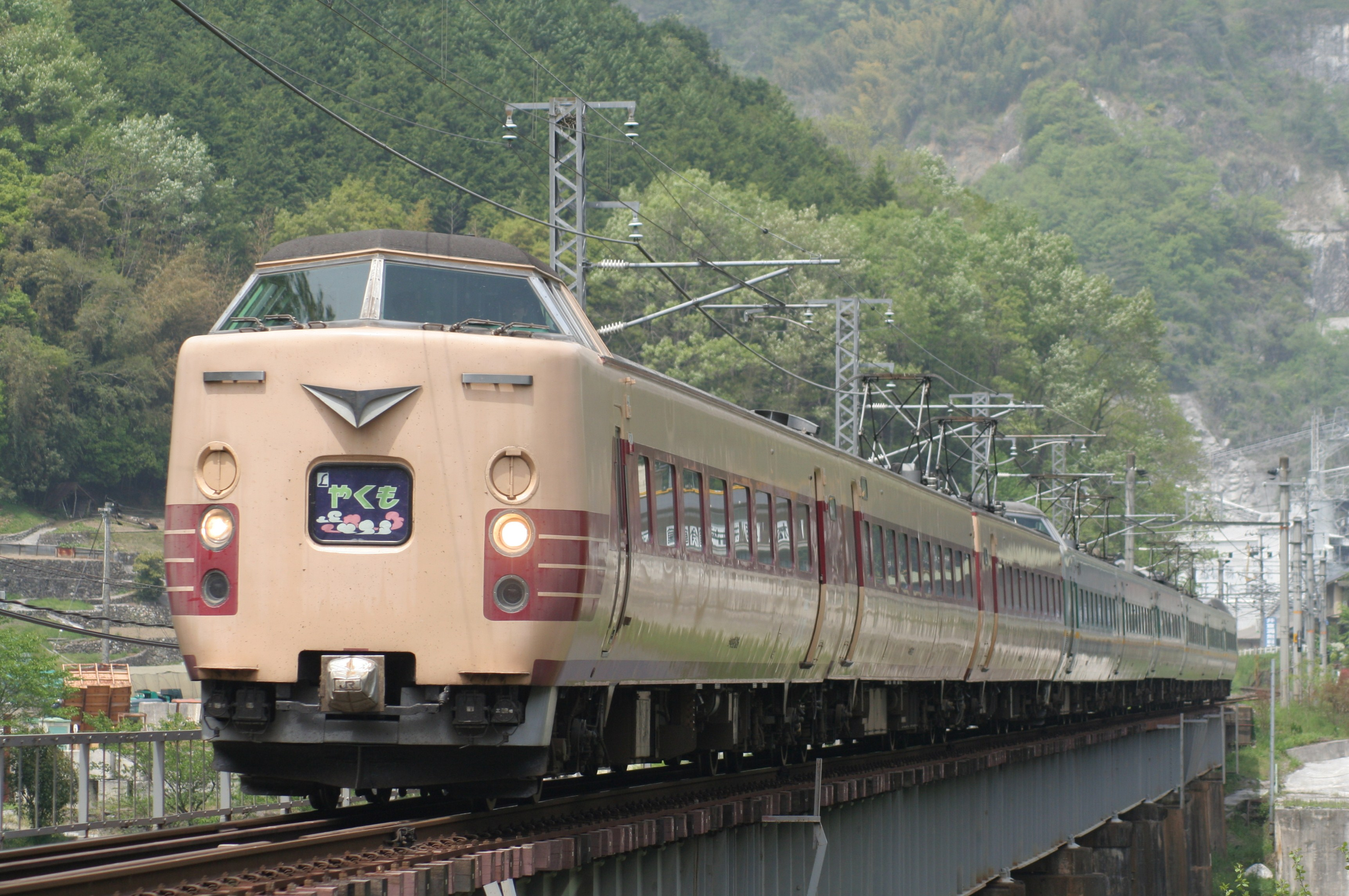 JR西日本381系電車 特急やくも14号 前側3両、日根野電車区所属国鉄色 伯備線、広石信号場 - 井倉（第7高梁川橋梁）